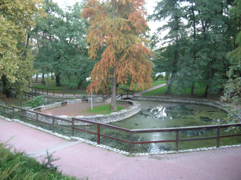 Park. Miskolc-Tapolca, Hungary.